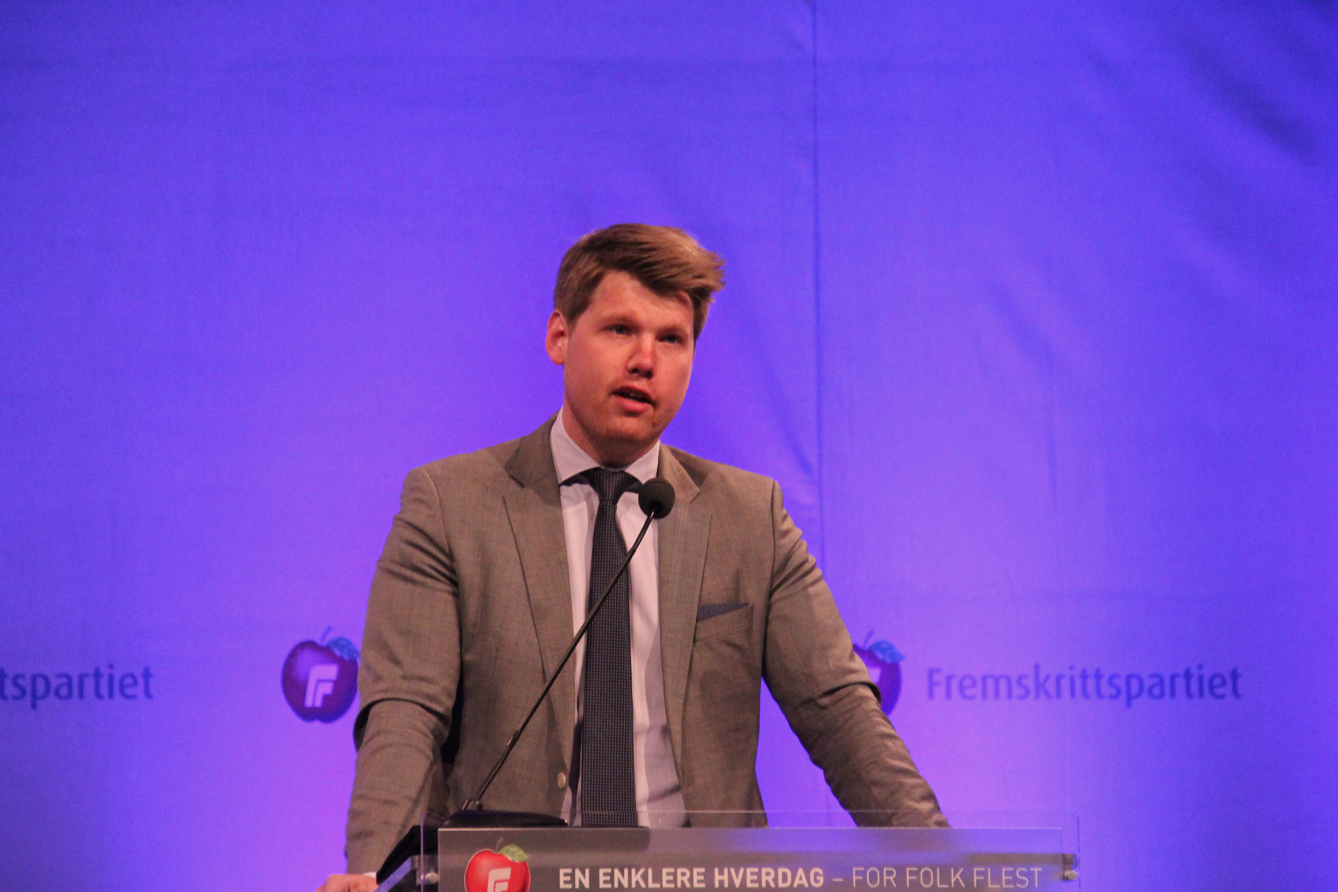 Atle Simonsen på Fremskrittspartiets landsmøte i 2014.